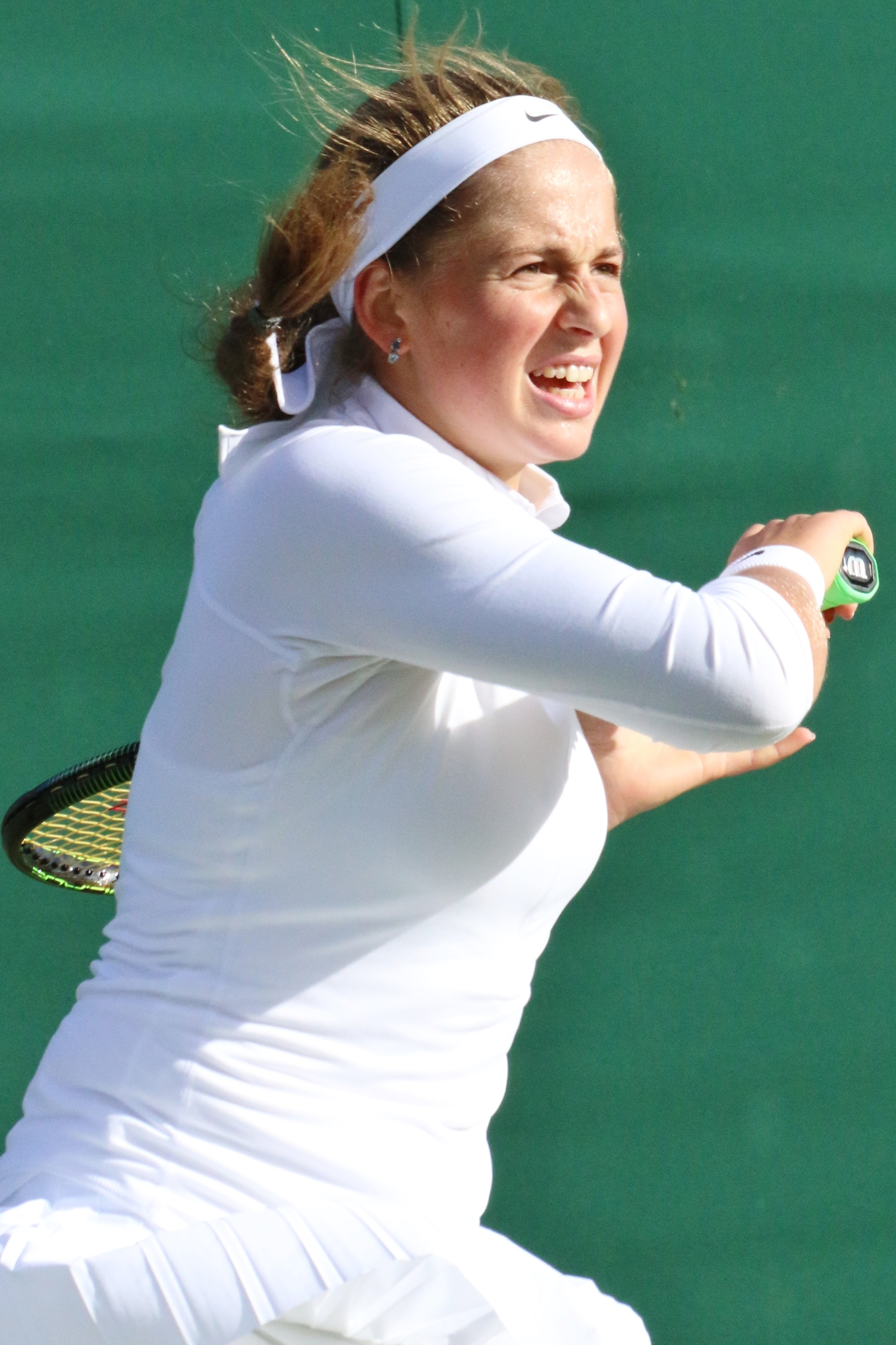 Ostapenko WM16 (23)